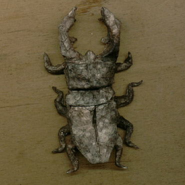 Elniaragis (lankstinio dizaineris - Seiji Nishikawa).